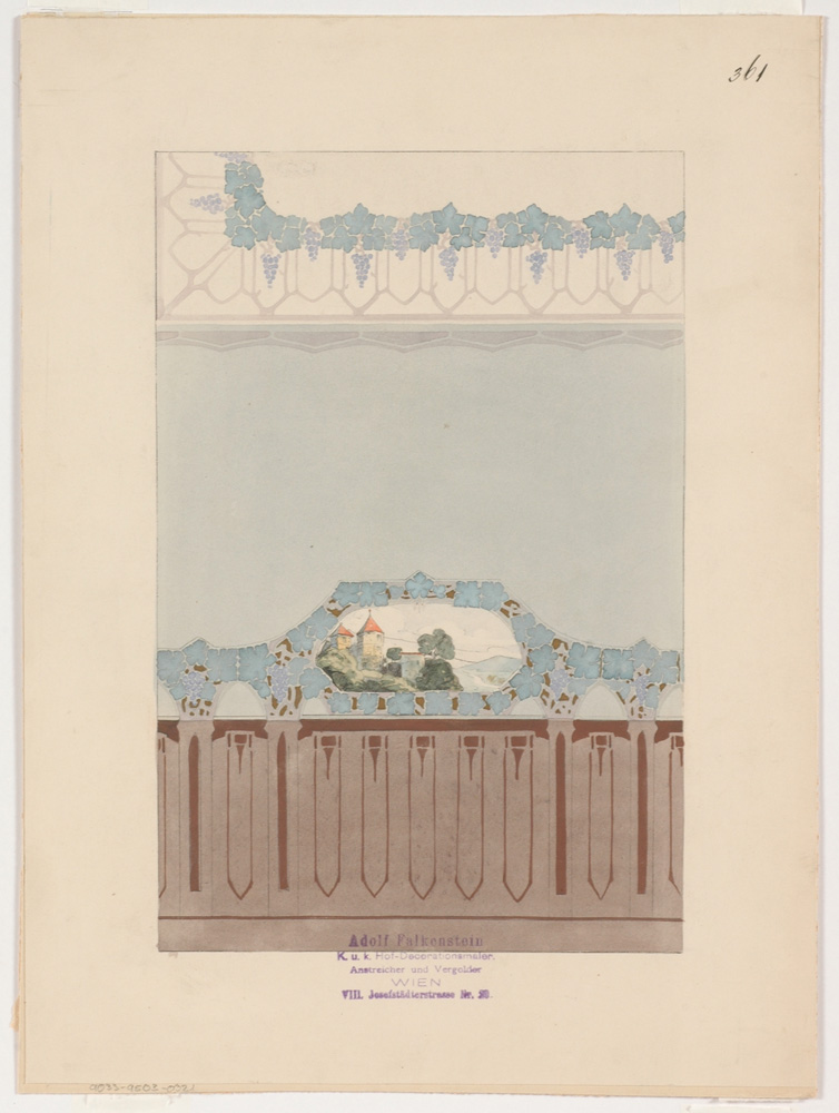 Jugendstilentwurf. 36,0 x 26,5 cm. Aquarell auf Papier, auf Karton gelegt mit Stempel.